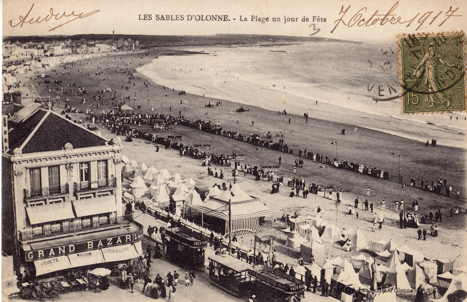 Carte postale ancienne éditée par Lucien Amiaud aux Sables d'Olonne, n°2878 :LES SABLES-D'OLONNE - La Plage, un jour de fête